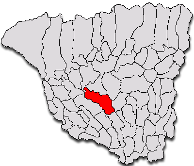 Categorie:Hărţi ale judeţului Gorj